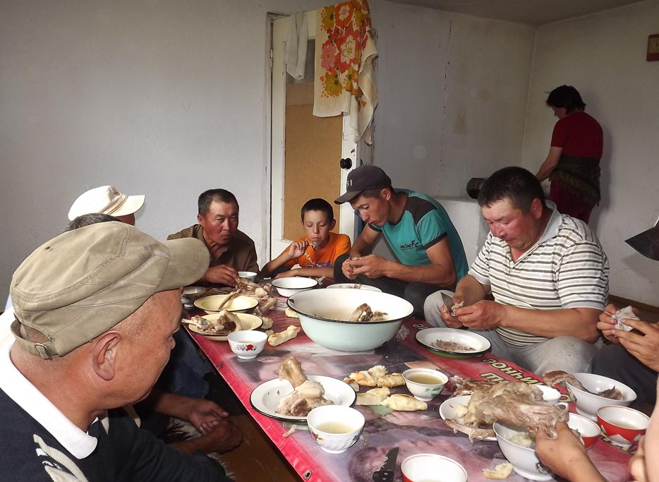 Мясо в традиционной киргизской кухне, (Көк-Мойнок, Ысык-Көл)